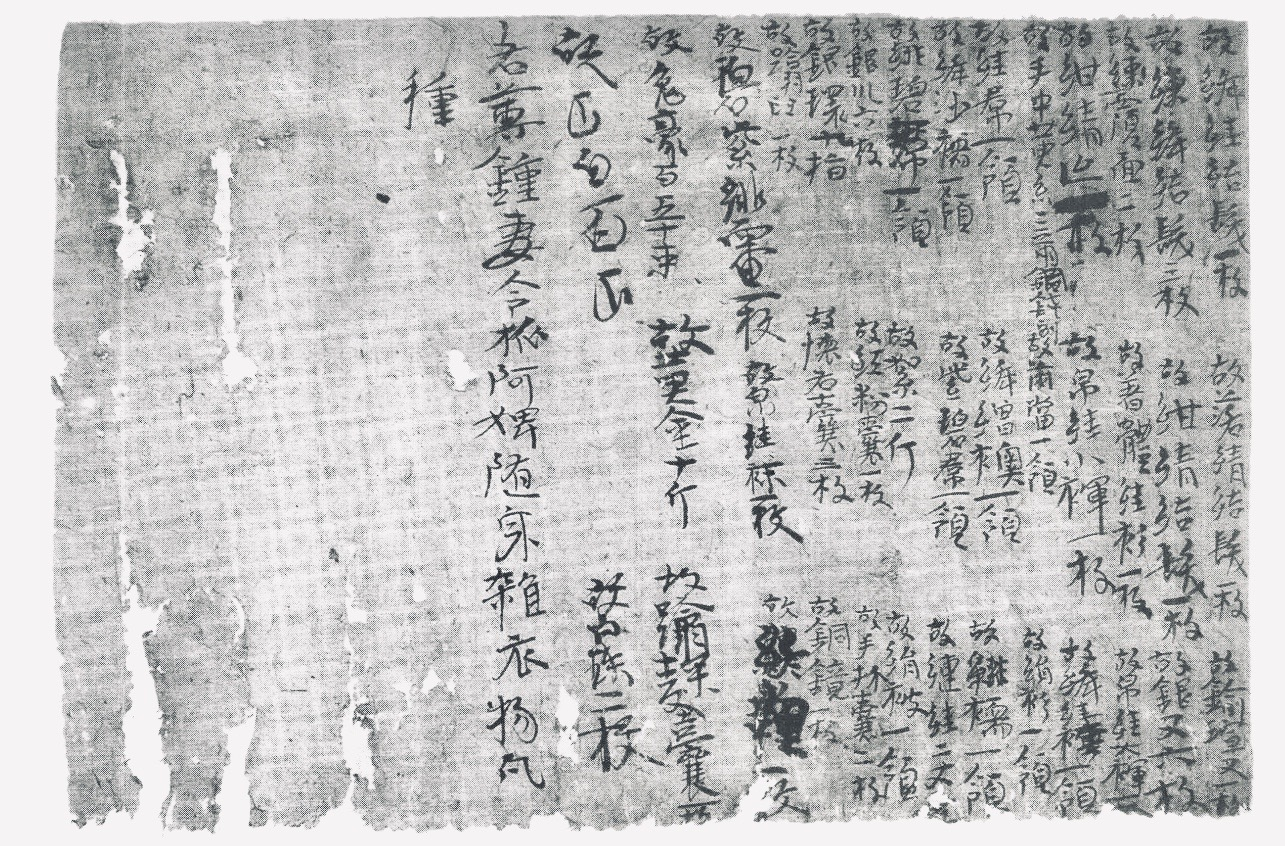 吝尊钟与令狐阿婢墓 衣物疏 出土于吐鲁番阿斯塔纳M408号墓 描述了所有陪葬品的明细